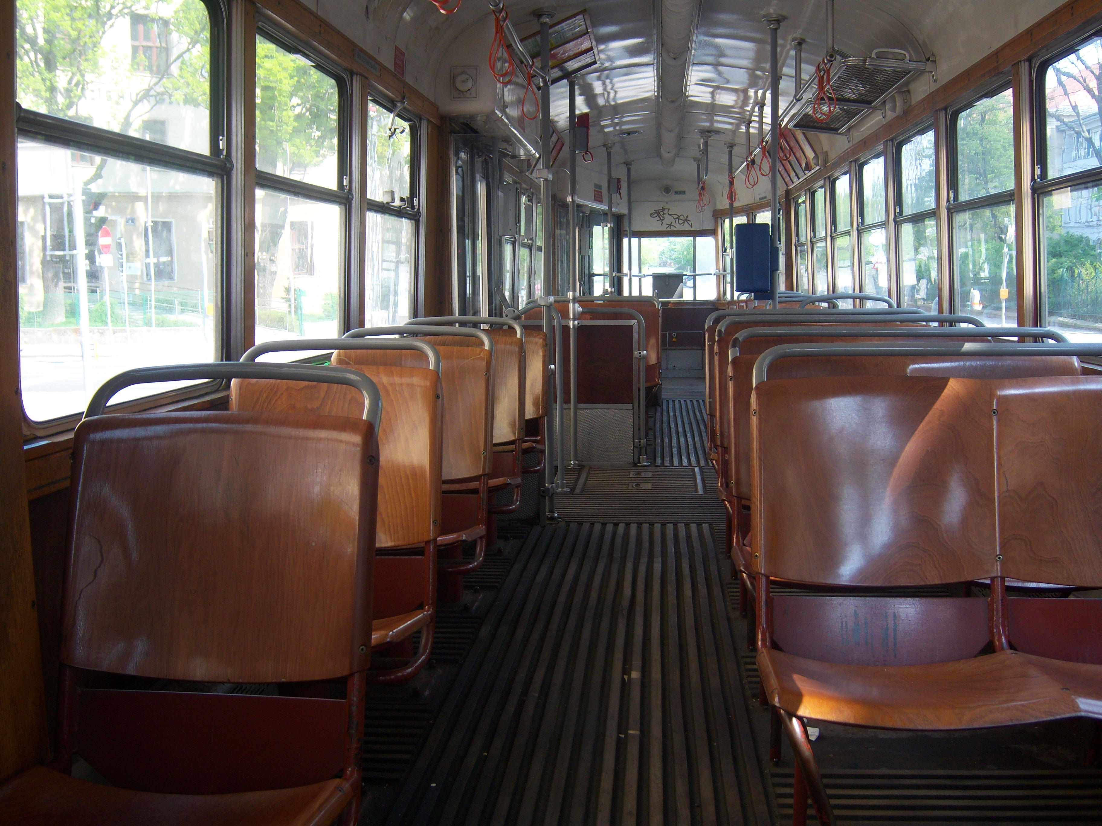 Innenraum eines Beiwagen c3